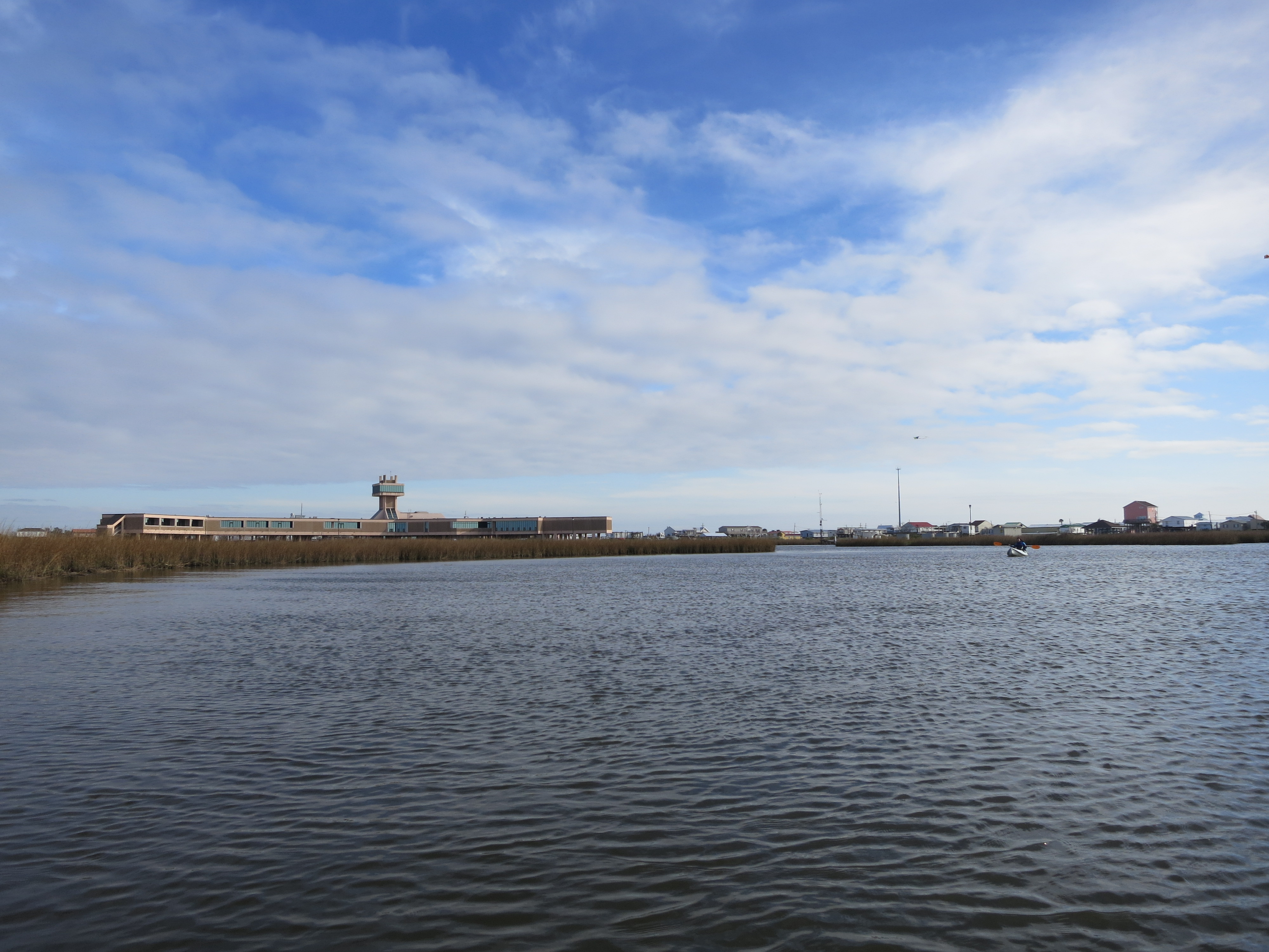 Louisiana Universities Marine Consortium (LUMCON) W. J. DeFelice Marine Center, Cocodrie, Louisiana.